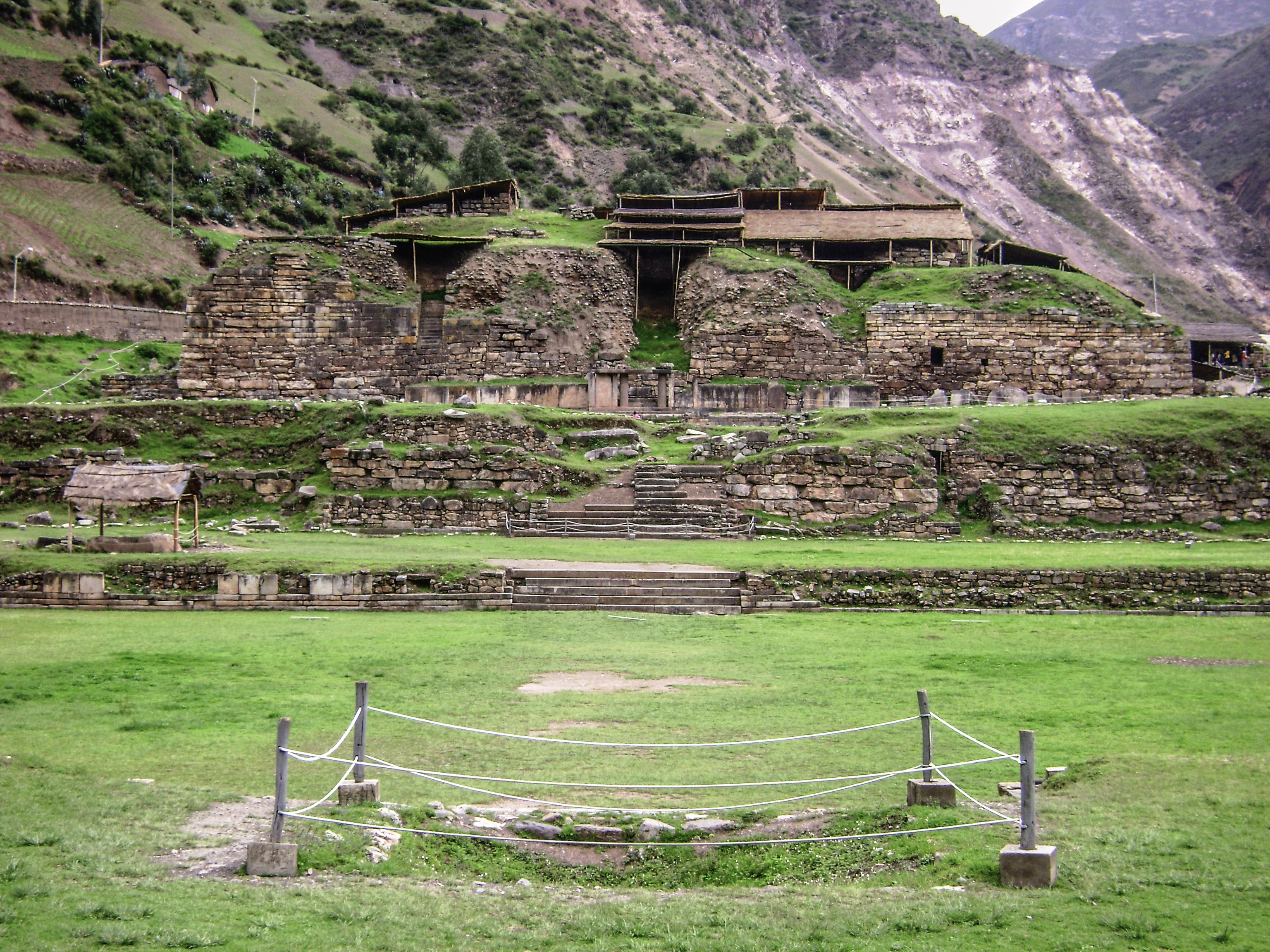 "El Castillo" es una estructura que conforma la sección "Templo Nuevo" en el sitio arqueológico "Chavín de Huántar". Región Ancash - Perú.